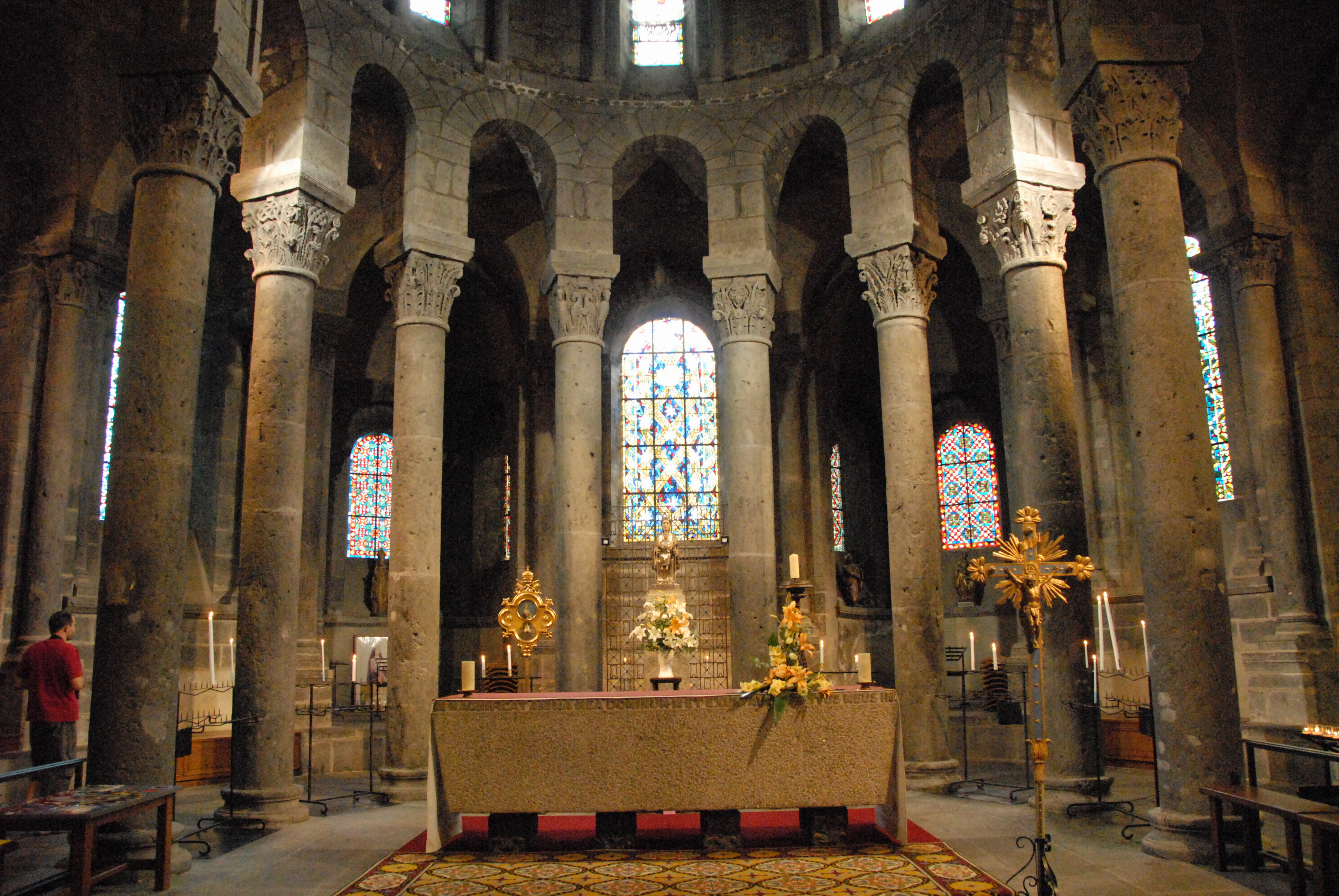 N.-Dame d'Orcival, Chorapsis